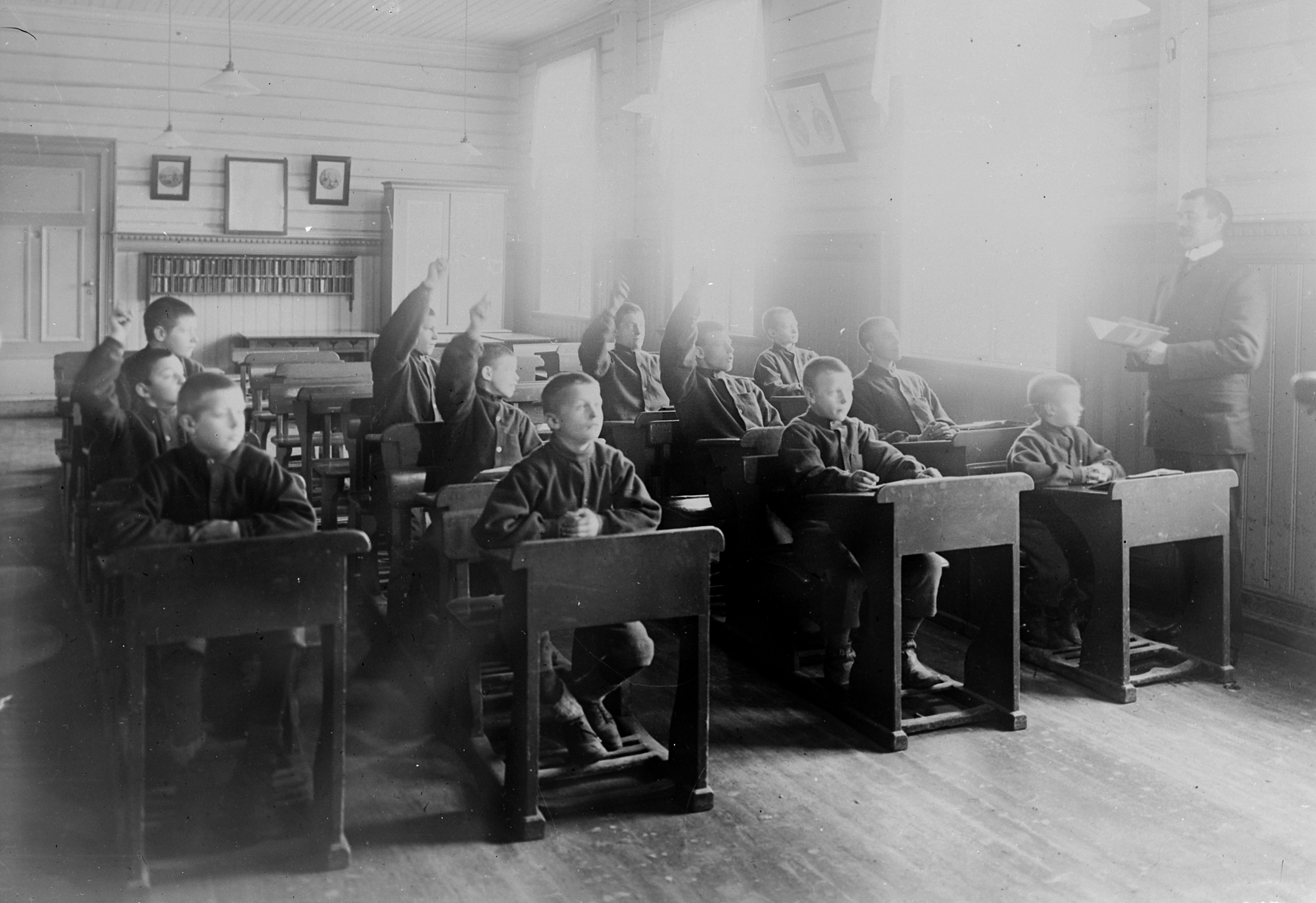 Skolehjemsgutter i klasserom på Falstad skolehjem. Lærer til høyre i bildet...Pupils in class room at Falstad reformative school. Teather to the right...Dato / Date: ca. 1915.Fotograf / Photographer: Bjerkan.Sted / Place: Falstad, Ekne, Nord-Trøndelag, Norge/Norway.Arkivreferanse /Archive reference: 0800337.